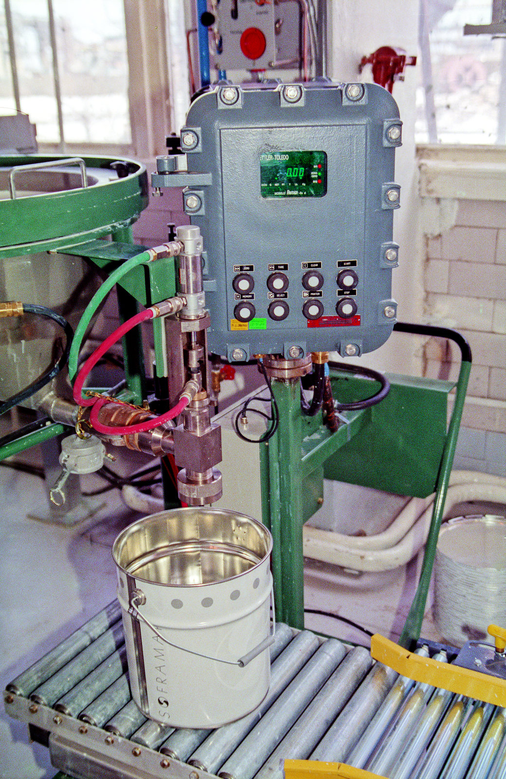 Фасовочный терминал фирмы «Толедо» готов заливать краску в ведро. Слева находится фильтрующее вибросито. Оттуда краска поступает на блестящий кран и течёт вниз в белое ведро. Ведро стоит на весах с крупными роликами. Кран на вибросите подключён к весовому терминалу (дозатор с кнопками и табло) через два красных и один зелёный шланги воздушного привода. При достижении нужного веса кран закрывается, а ведро уходит на конвейер с мелкими роликами и жёлтыми боками. — Идёт презентация лакокрасочного завода «Модуль». Лакокрасочный завод «Модуль» открылся 6 апреля 2001 года и принадлежал компании «Стройкомплект». В мае 2005 года завод переименован в «ЛАКОС коутингс» («LACOS coatings»), а его владелец стал группой компаний «ЛАКОС» («LACOS group»). В 2013 году это оборудование было разобрано. Город Переславль, технопарк «Славич», корпус 39-б.